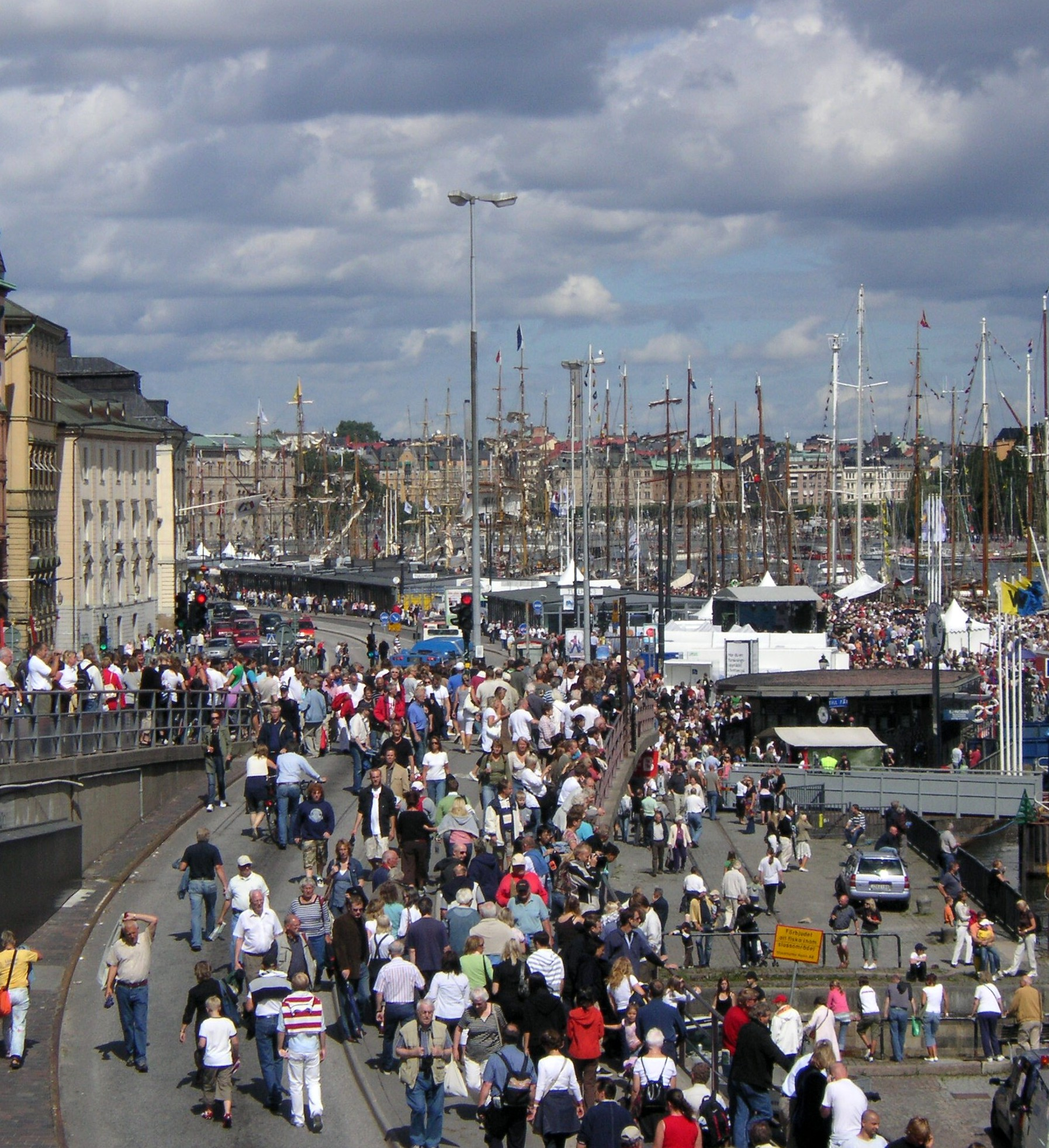 Skeppsbrokajen i Stockholm vid Tall ship's races 2007